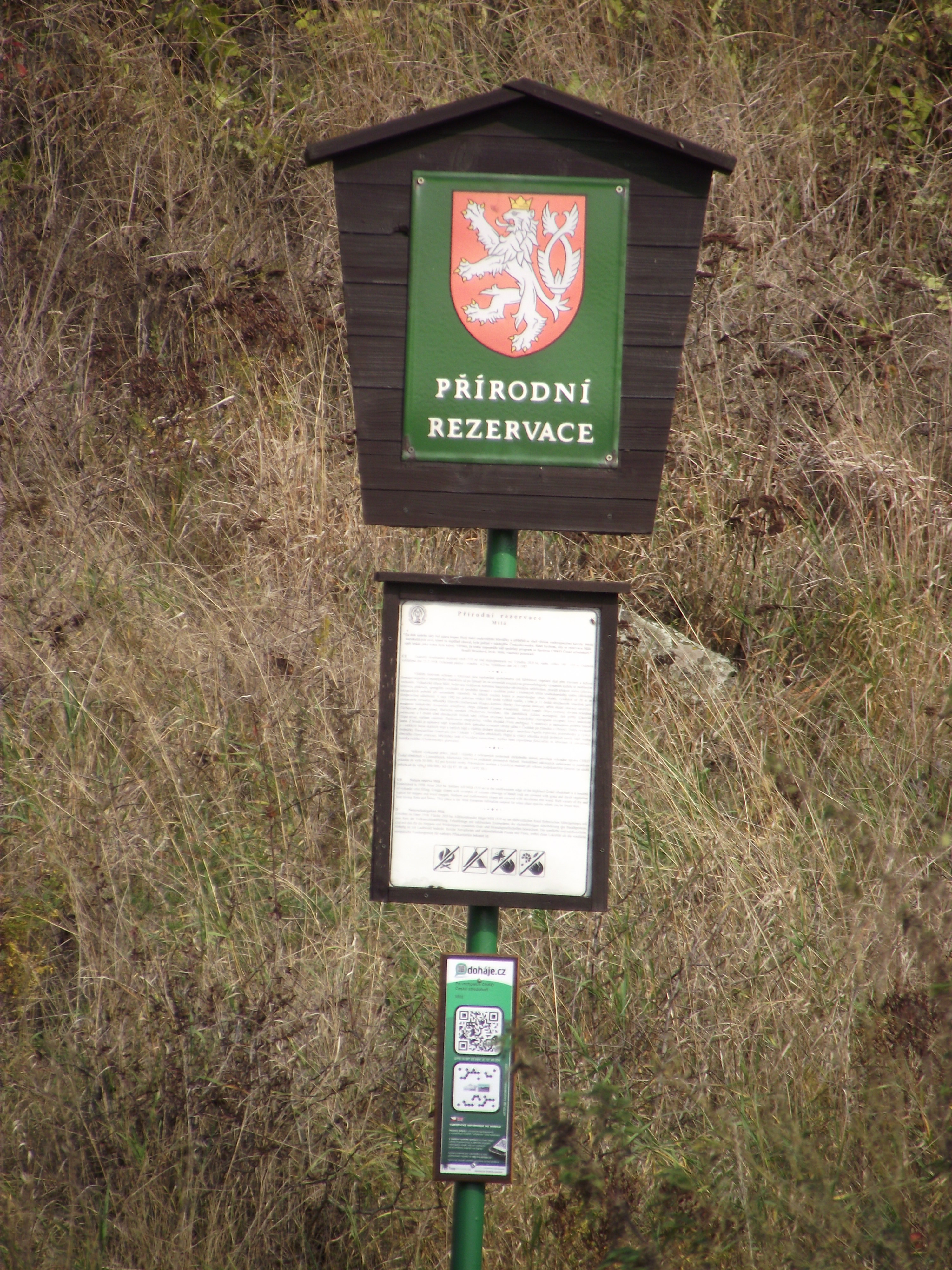 Přírodní rezervace